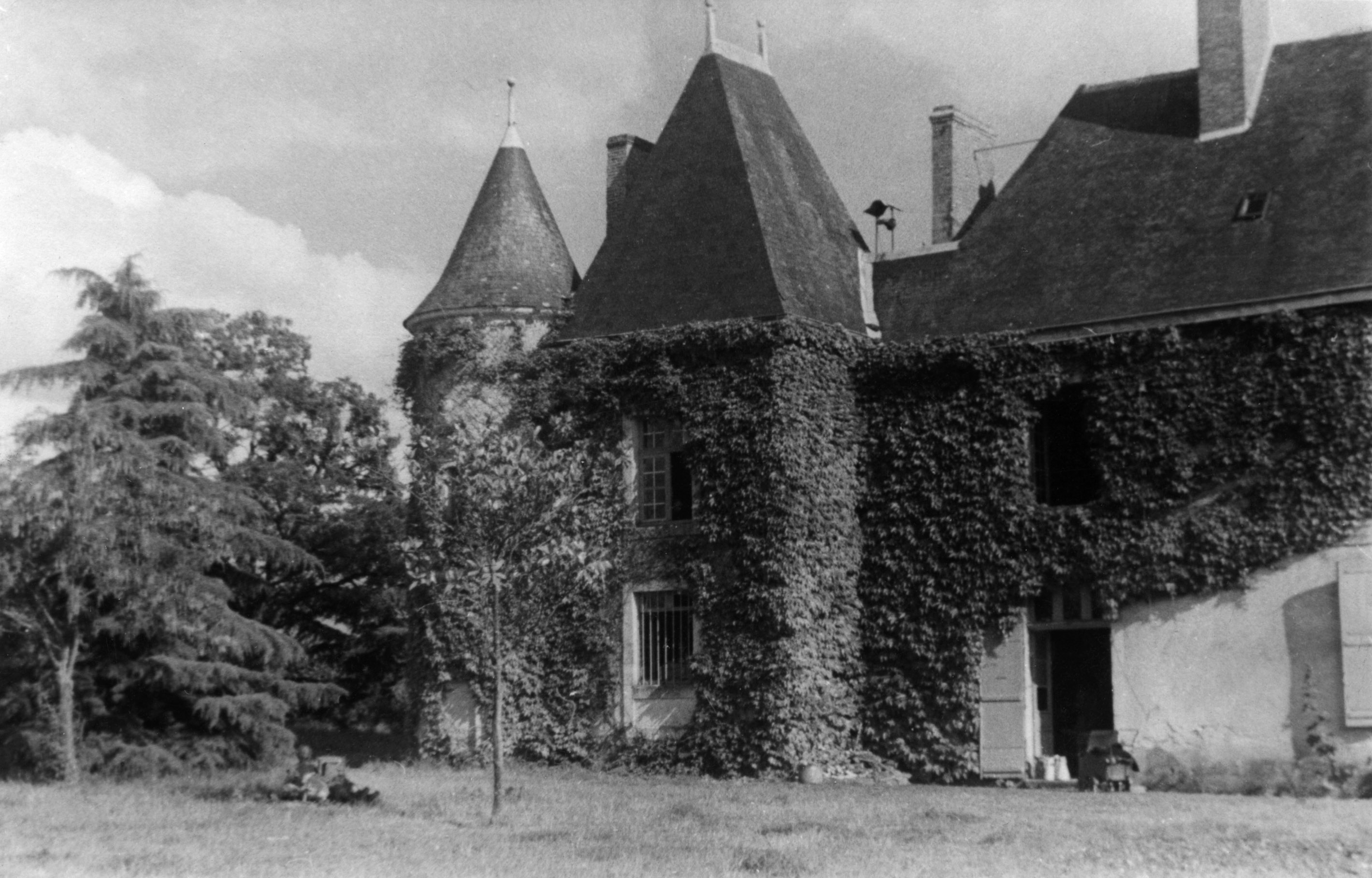 Le château de Princé (La Chapelle-Saint-Laud) en 1944